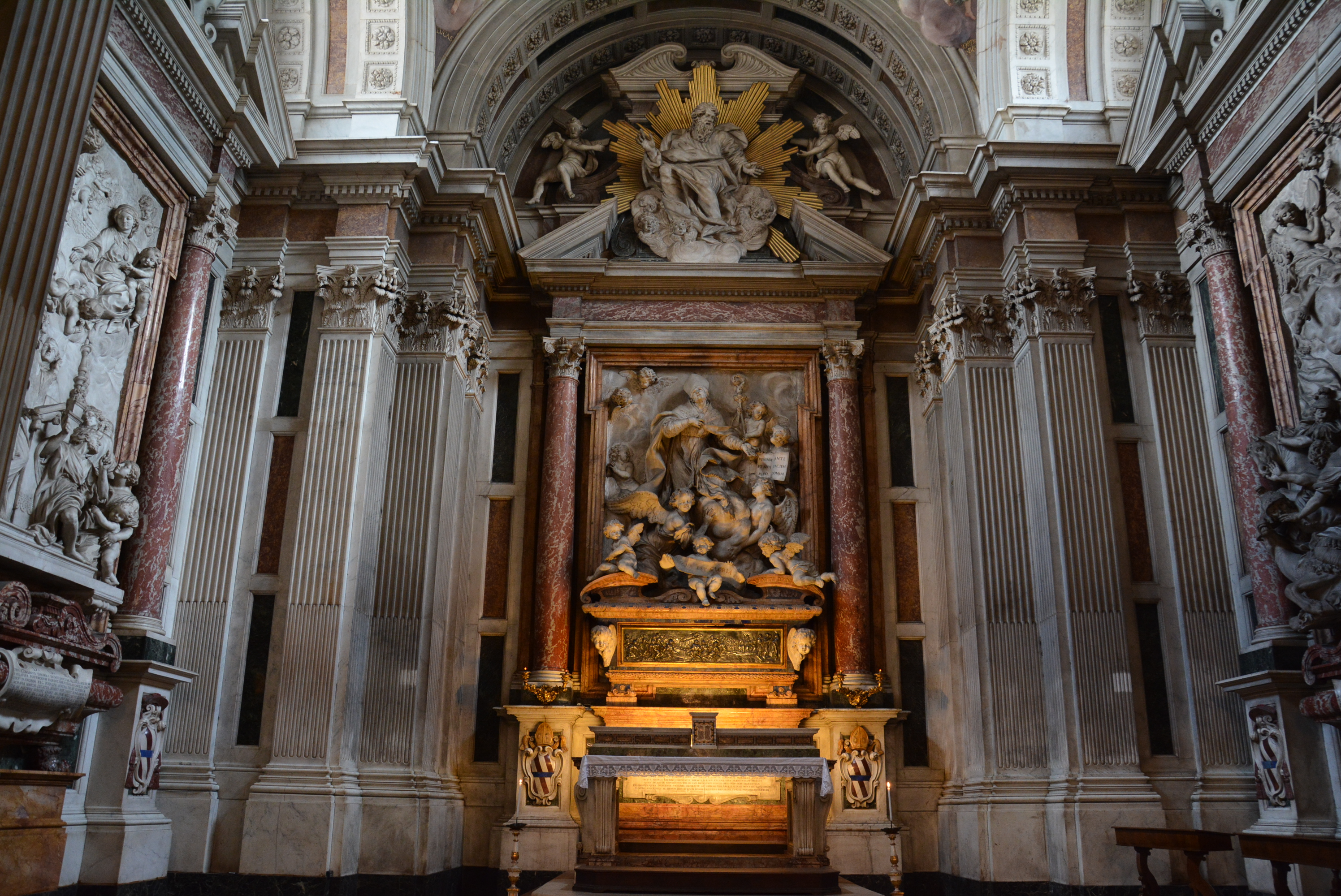 Basilica di Santa Maria del Carmine a Firenze